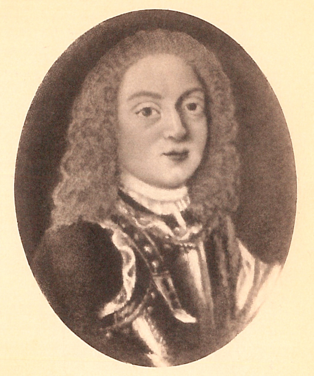 Hans Hansen Schmidt (-1681), adlet Lillienschiold (Lillienchiold)